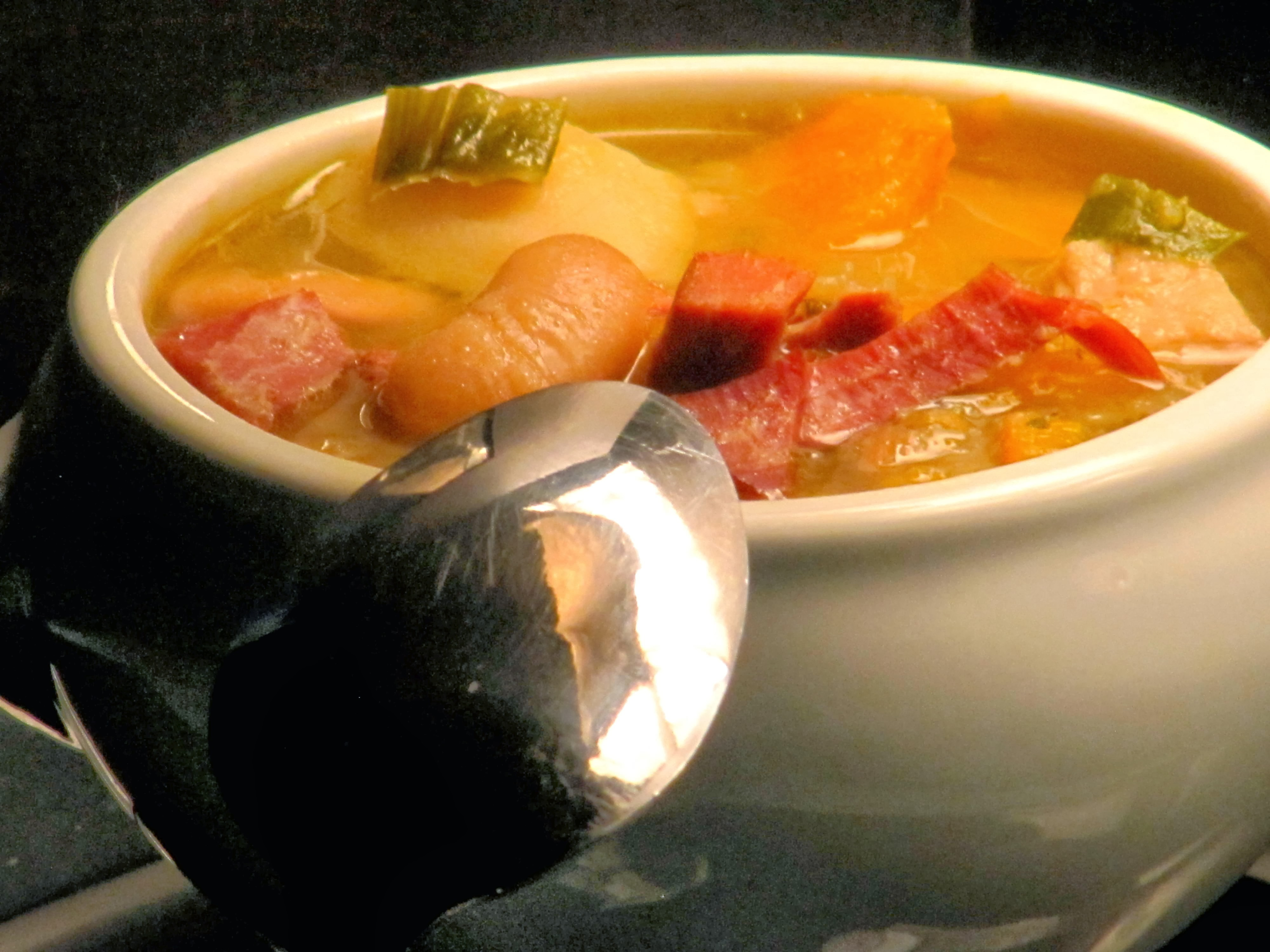 Garbure du Béarn élaborée avec du jambon de Bayonne, du sel de Salies de Béarn et des Haricots maïs du Béarn